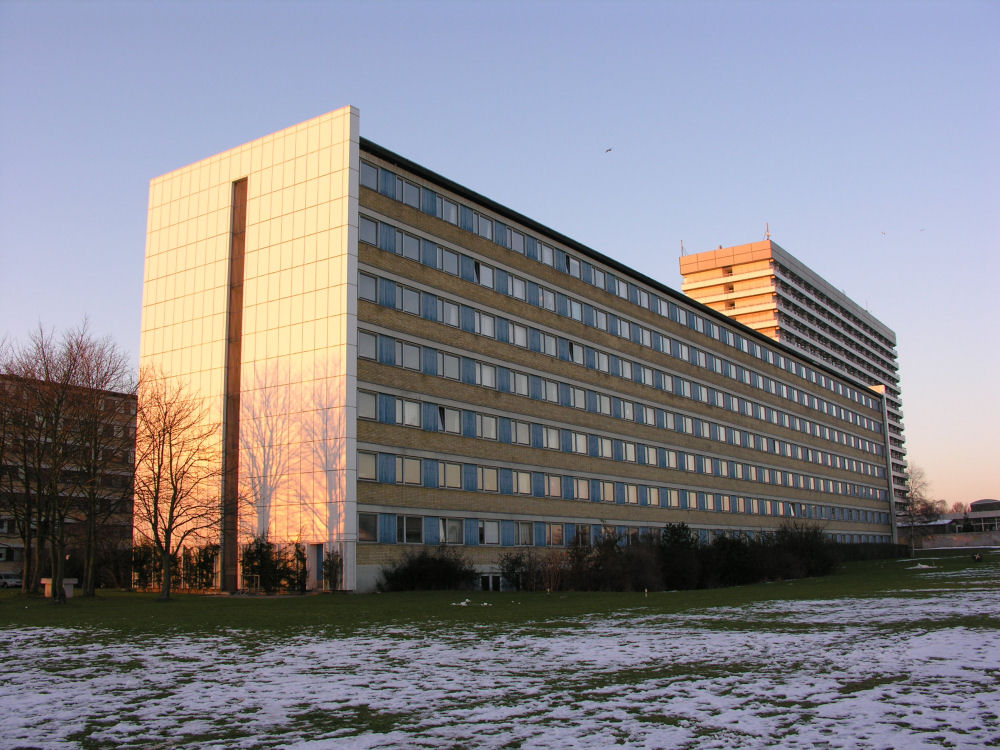 Rebæk Søpark Kollegiet